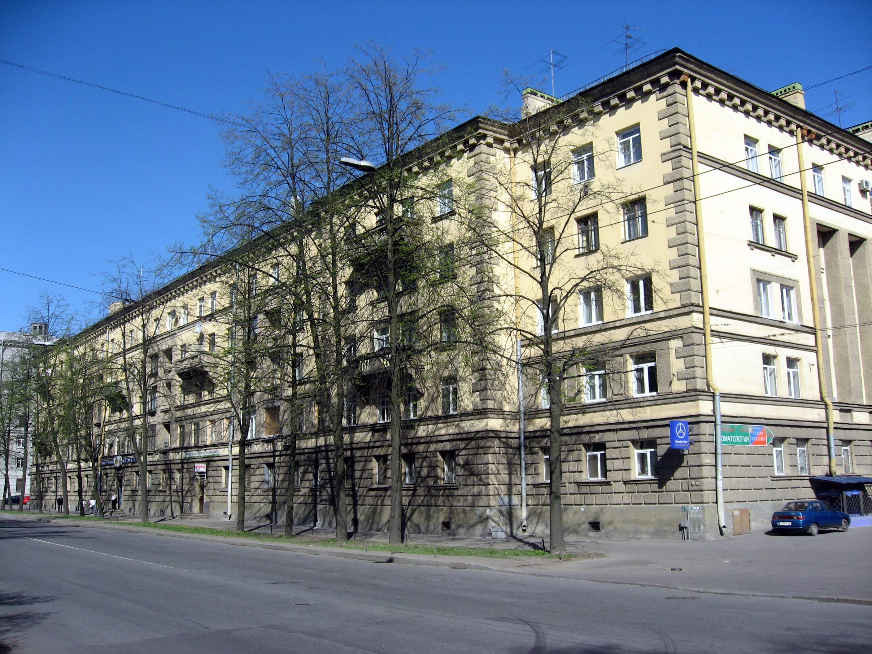 Sankt-Petěrburg